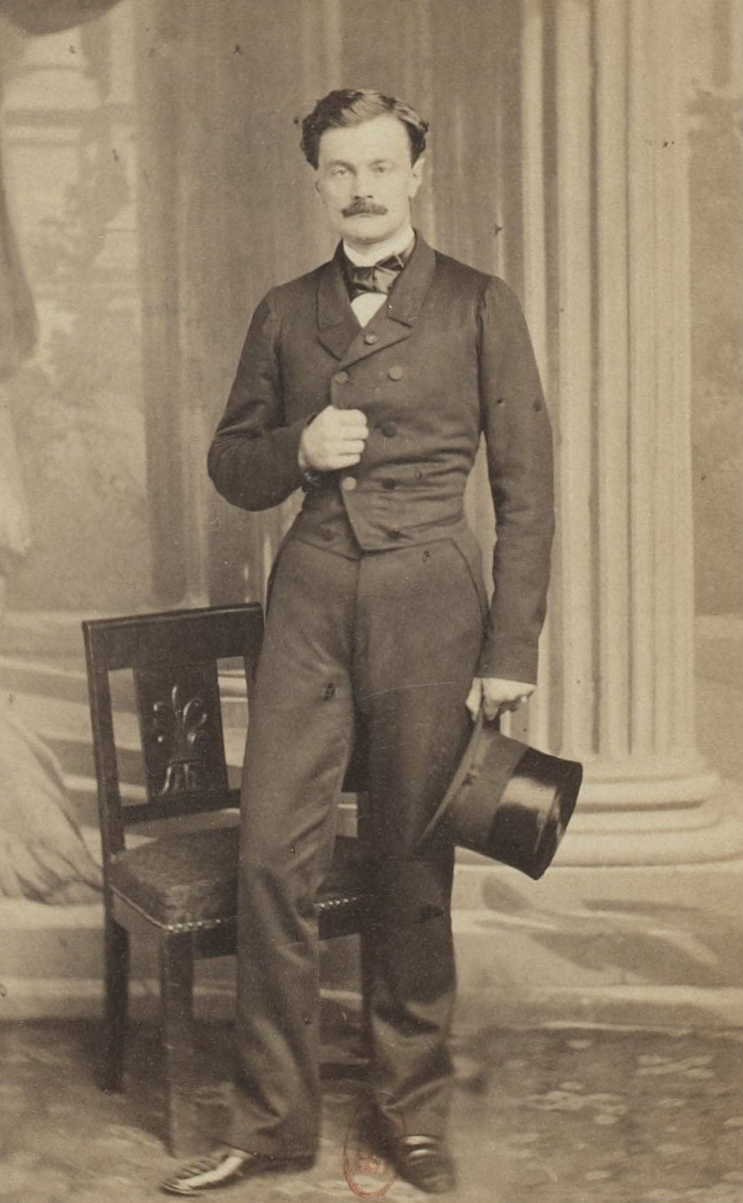 Album des députés au Corps législatif entre 1852-1857.